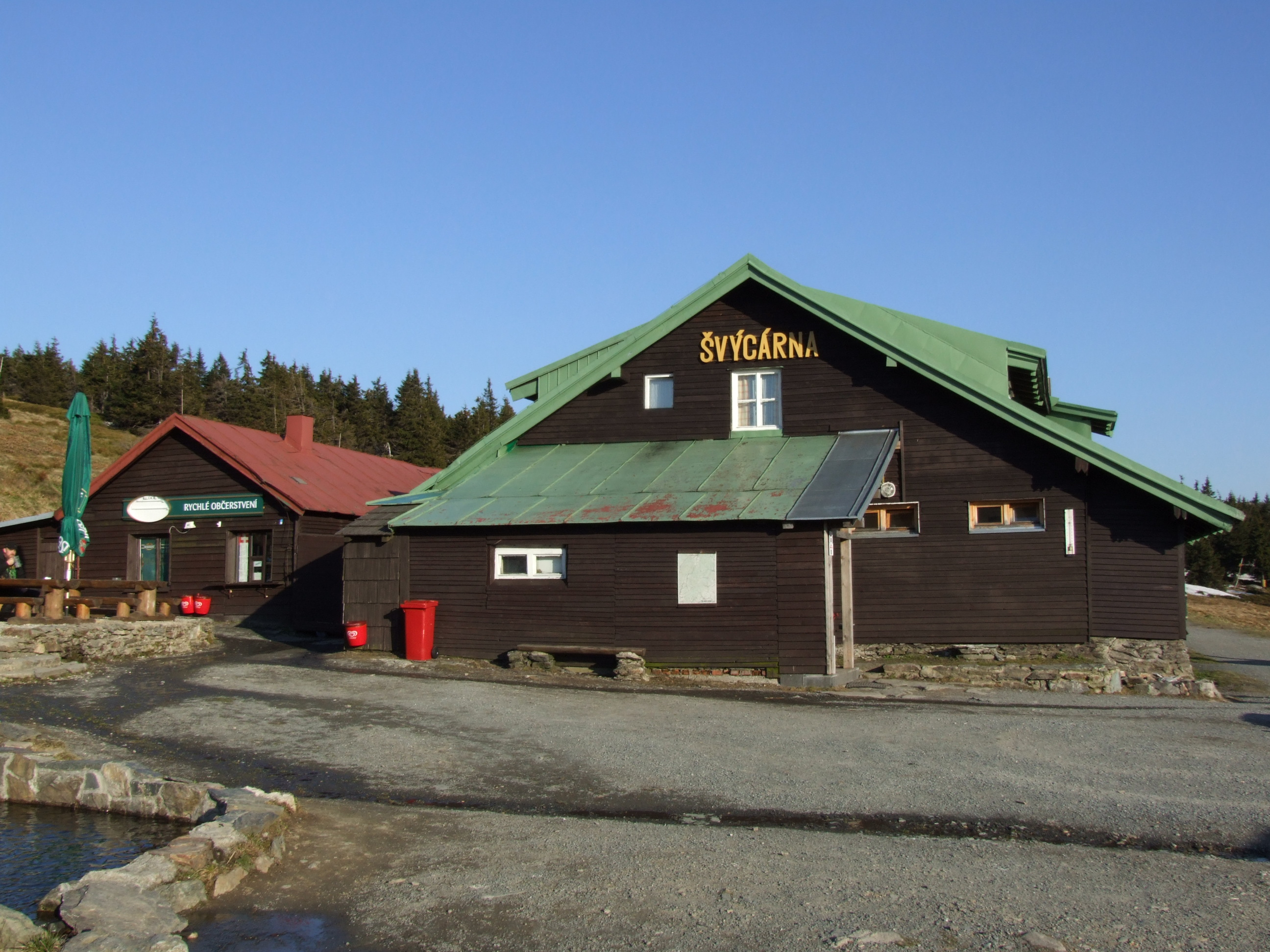 Švýcarna (Schweizerei) - mountain hostel in Jeseníky (Gesenke)